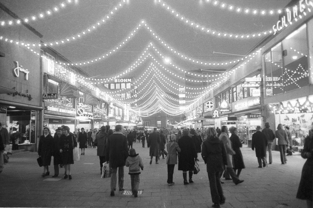 Weihnachtsbeleuchtung. Blick von Höhe Schevenbrücke zur Fleethörn.